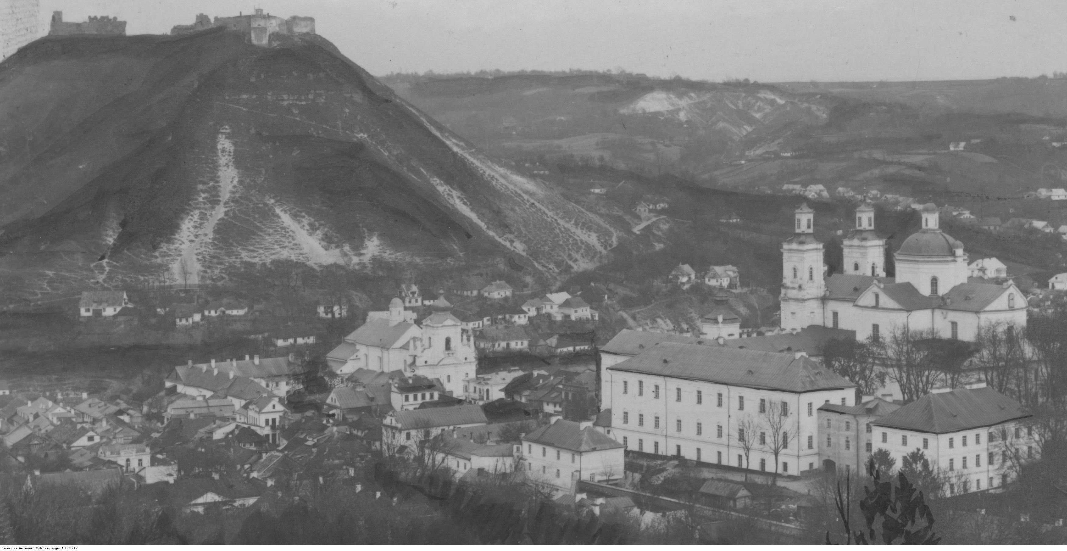 Krzemieniec - kościół Jezuitów pw. śś. Ignacego Loyoli i Stanisława Kostki oraz Liceum Krzemienieckie, w tle Góra Bony z ruinami zamku. Koncern Ilustrowany Kurier Codzienny - Archiwum Ilustracji. Sygnatura: 1-U-3247